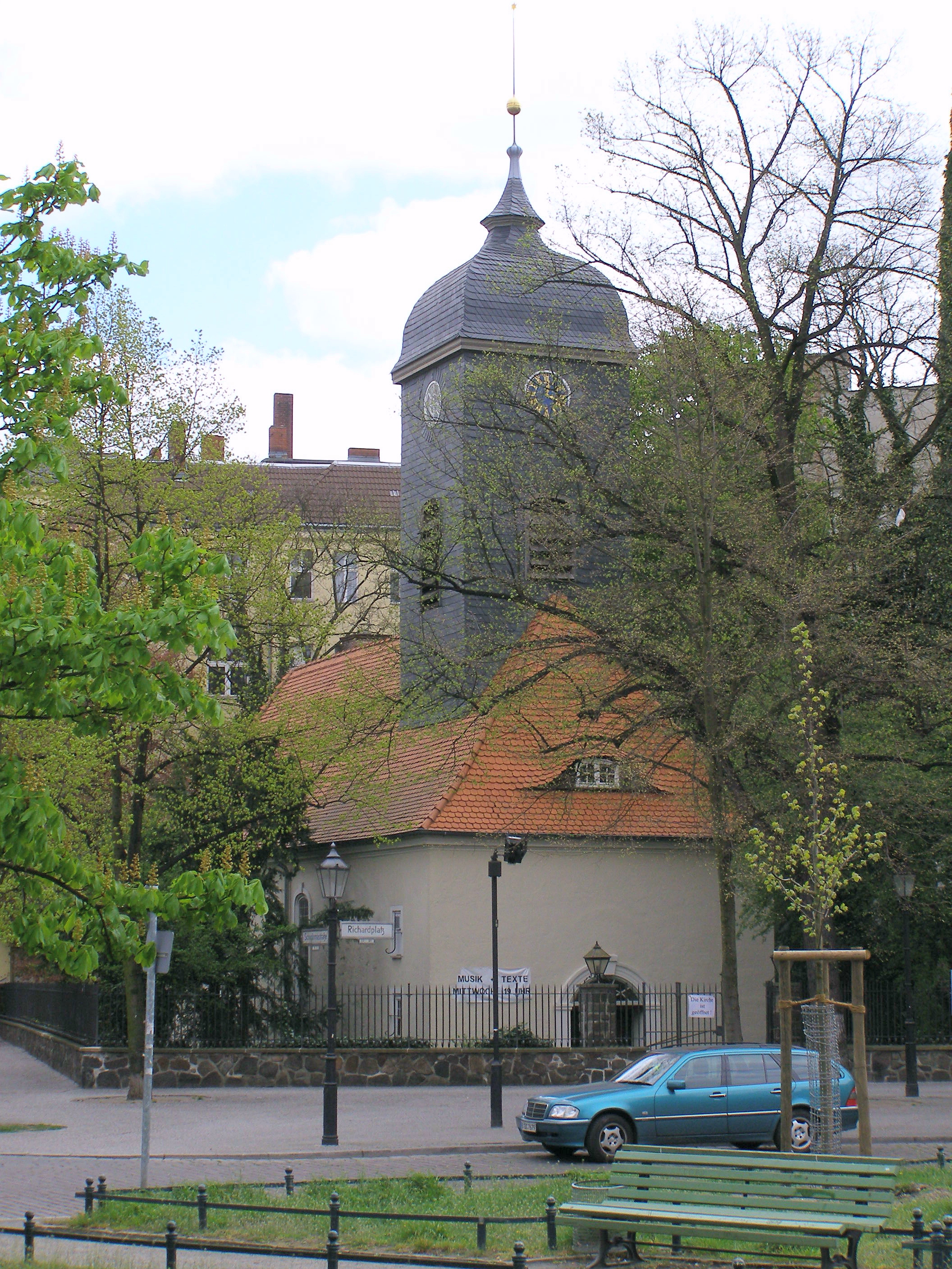 „Böhmisch-Rixdorf“ in Berlin, Bethlehem Kirch („Rixdorfer Dorfkirche“) „Český Rixdorf“ v Berlíně, Betlémský kostel („Rixdorfský vesnický kostel“) „Bohemian Rixdorf“ in Berlin, Bethlehem Curch („Rixdorf village church“)